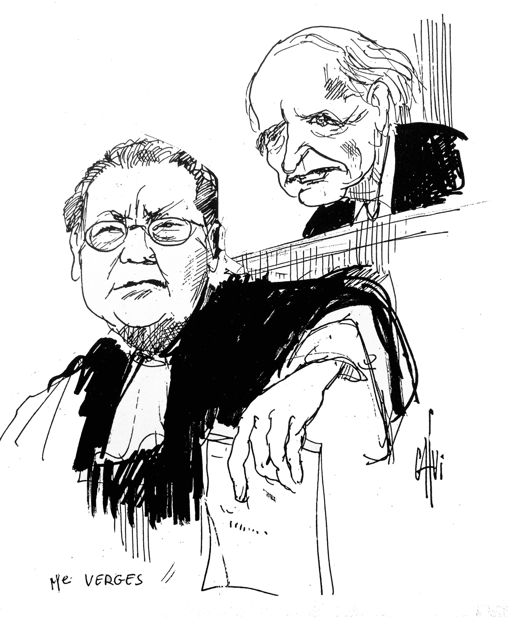 Jacques Vergès et Klaus Barbie lors de son procès Croquis d'audience